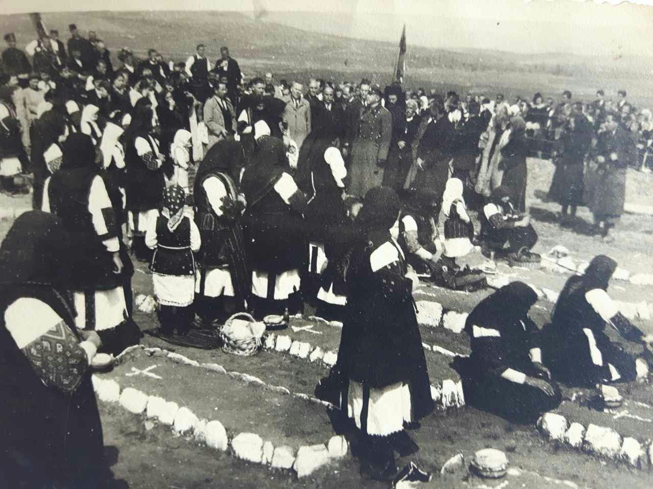 1915-1918 г., Военото гробиште с. Српци Паша (денес Долно Српци), Битолско